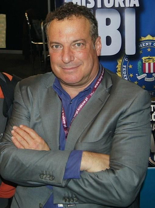 Tim Weiner in Poland.